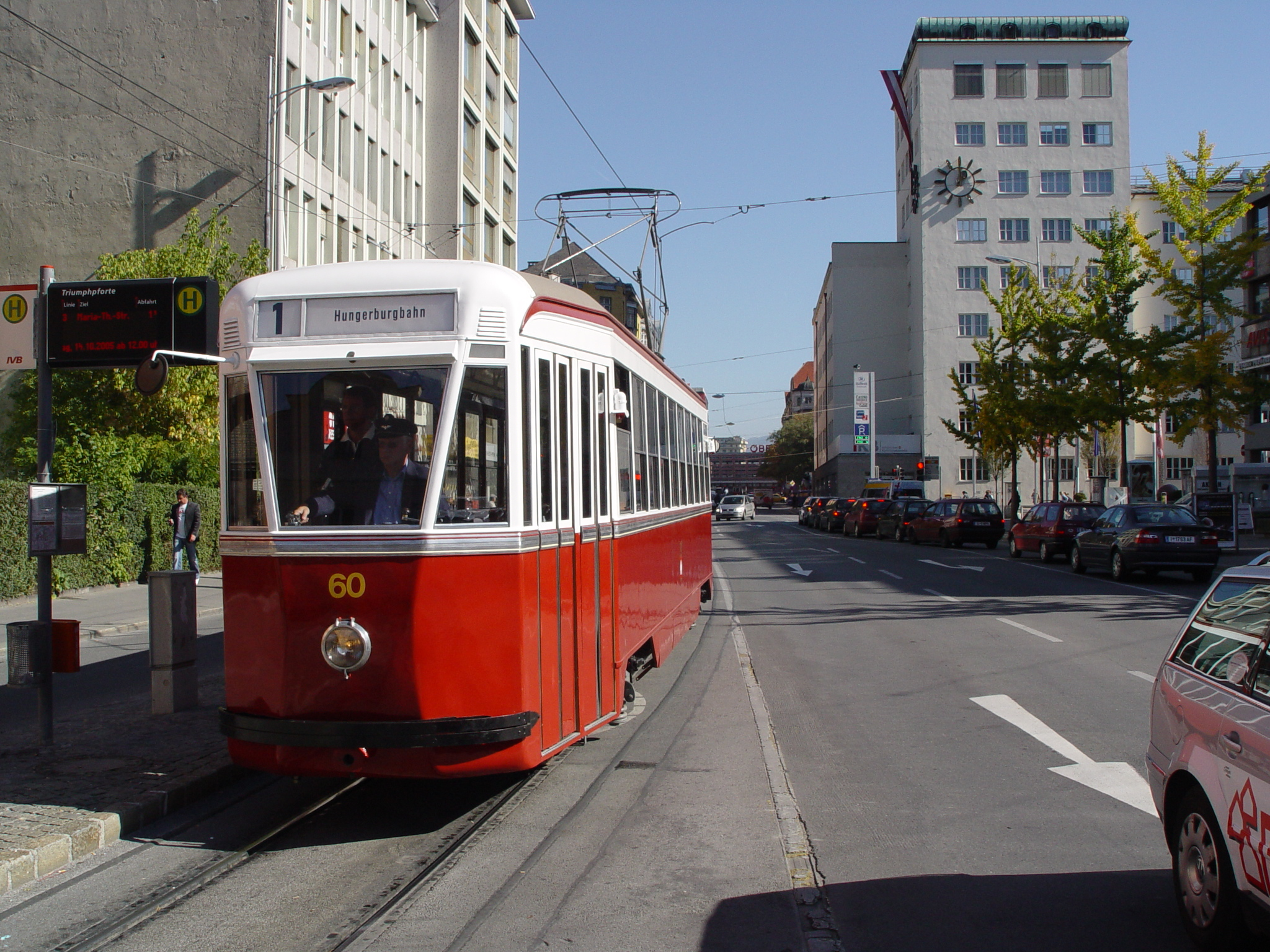 Triebwagen 60 („Mailänder“) der Tiroler Museumsbahnen anlässlich einer Parade nahe der Triumphpforte